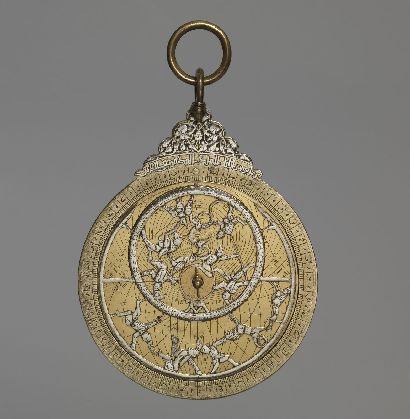 Hersteller: Al-Sahl al-Nisaburi (auch: Al-Sahl al-Asturlabi al-Nisaburi ) Datierung: 1178 / 1191 oder 1284 / 1299 Ort: Hama (Syrien) Material/Technik: Messing, Silbereinlagen, Silberauflagen Ausstellungsort: Germanisches Nationalmuseum in Nürnberg